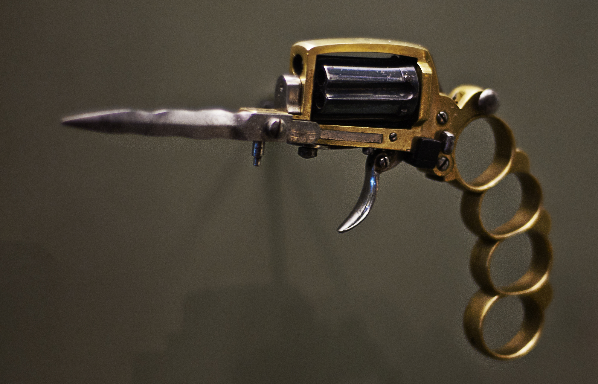 Revolver "casse-tete" Liége, 1875